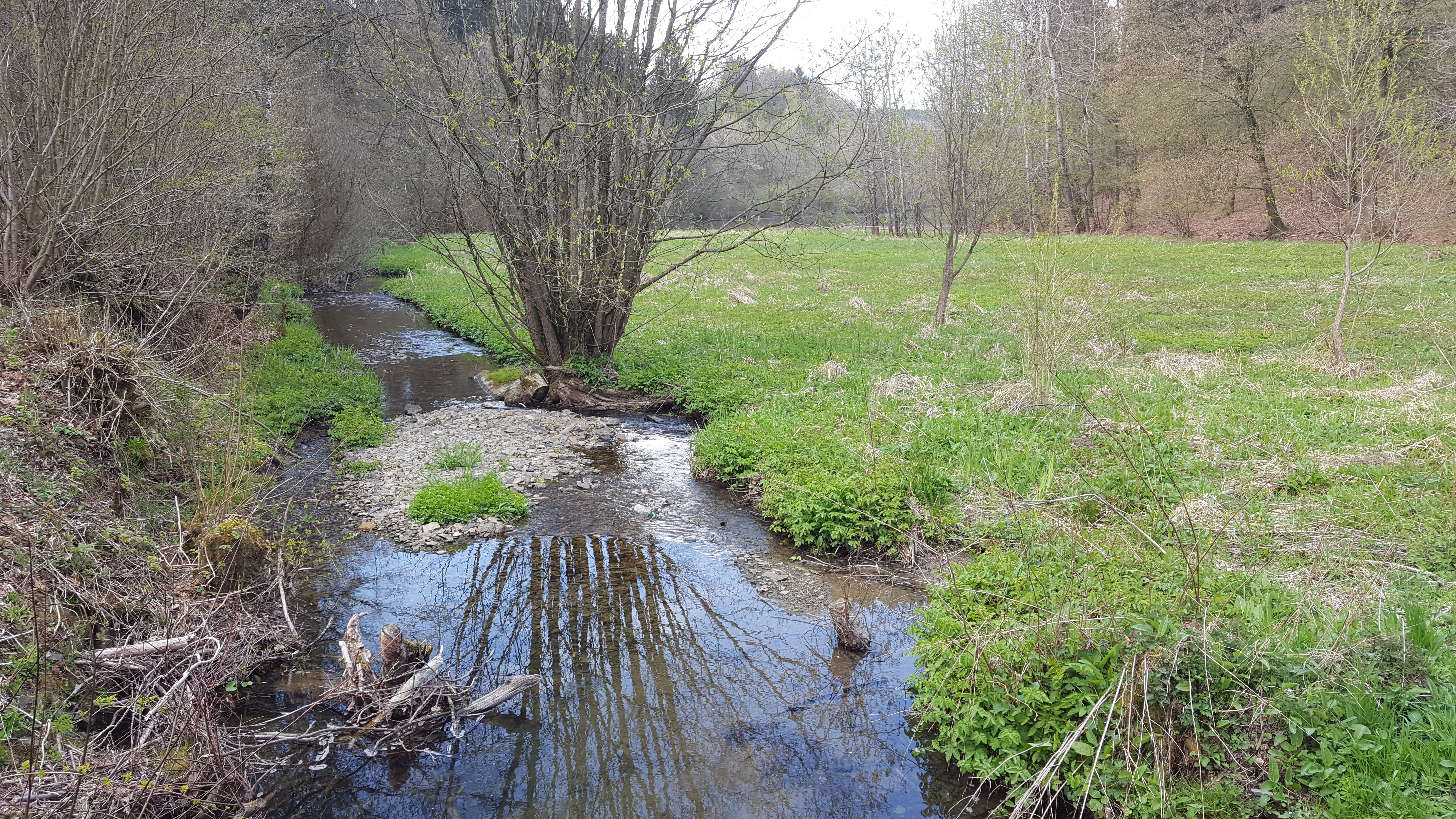 Dumicke in nordöstlicher Richtung, kurz vor Mündung in den Biggesee